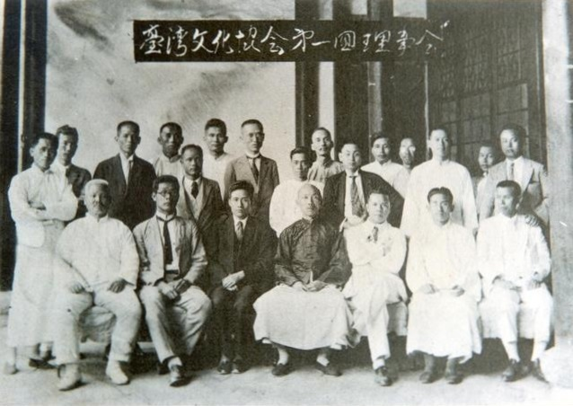 臺灣文化協會第一回理事會 臺北